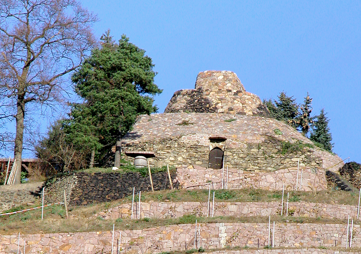 18.11.2009 01445 Radebeul-Oberlößnitz: Steinerne Schnecke im Weingut Drei Herren. [DSCN30206.TIF]20091118152DR.JPG(c)Blobelt